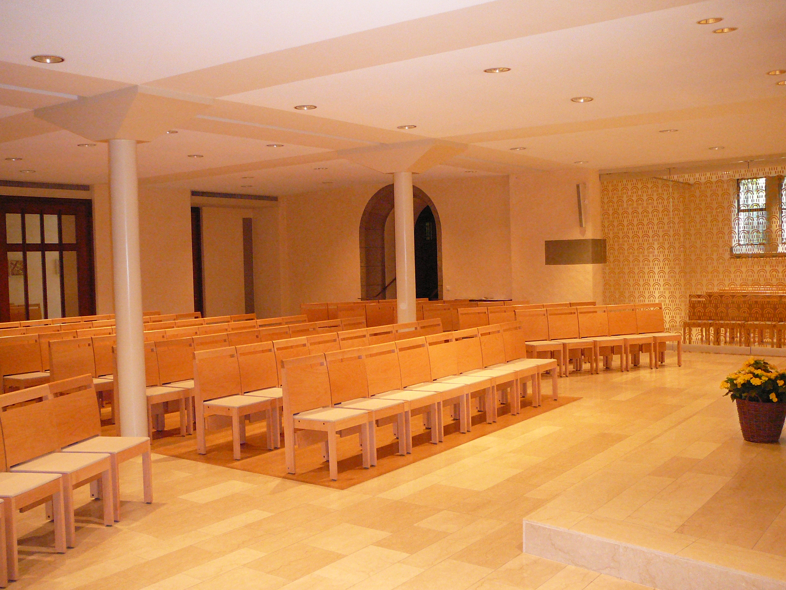 Römisch-katholische Kirche St. Anton Zürich-Hottingen, Unterkirche